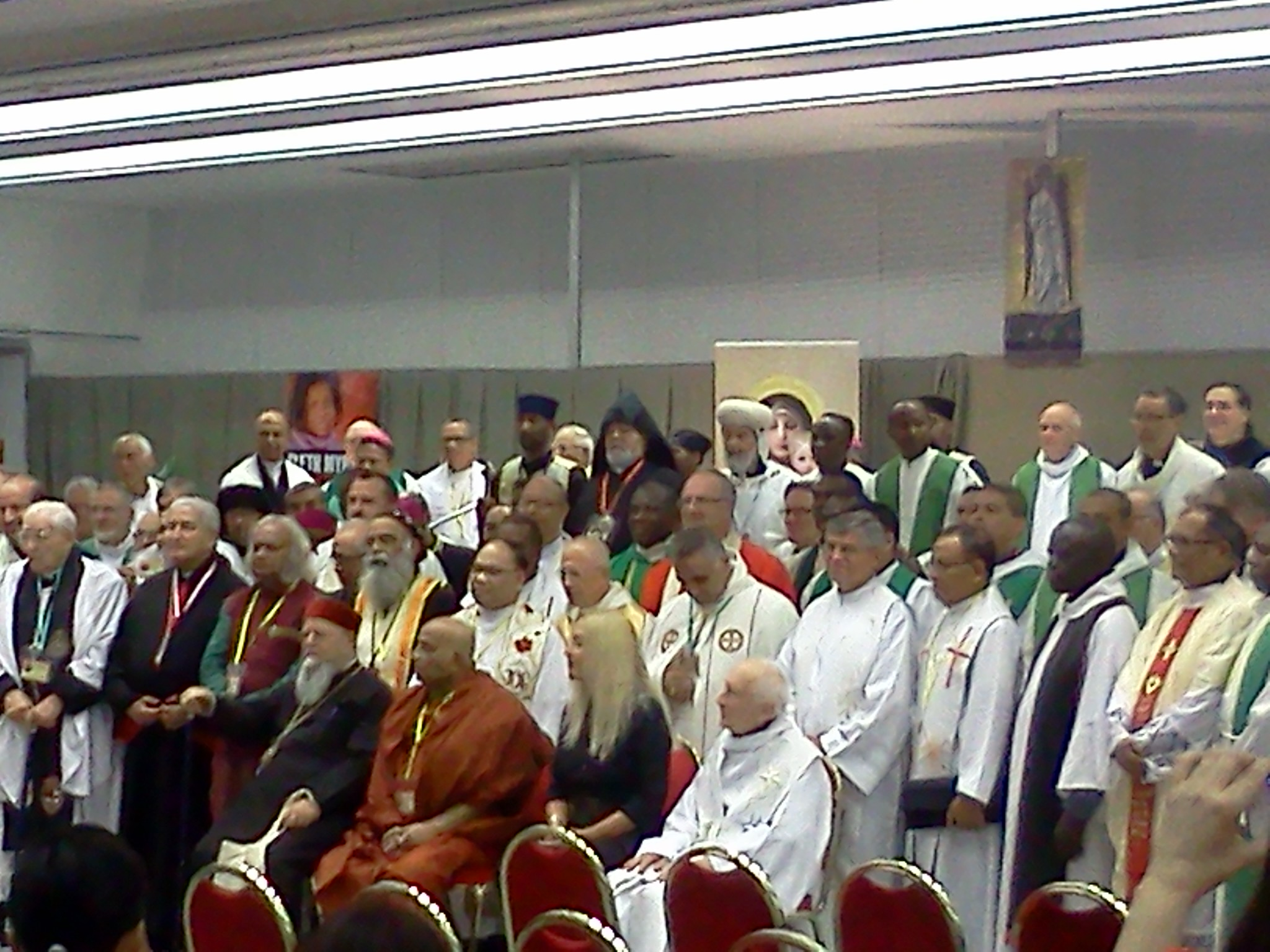 Spotkanie z czytelnikami Orędzi "Prawdziwego życia w Bogu"